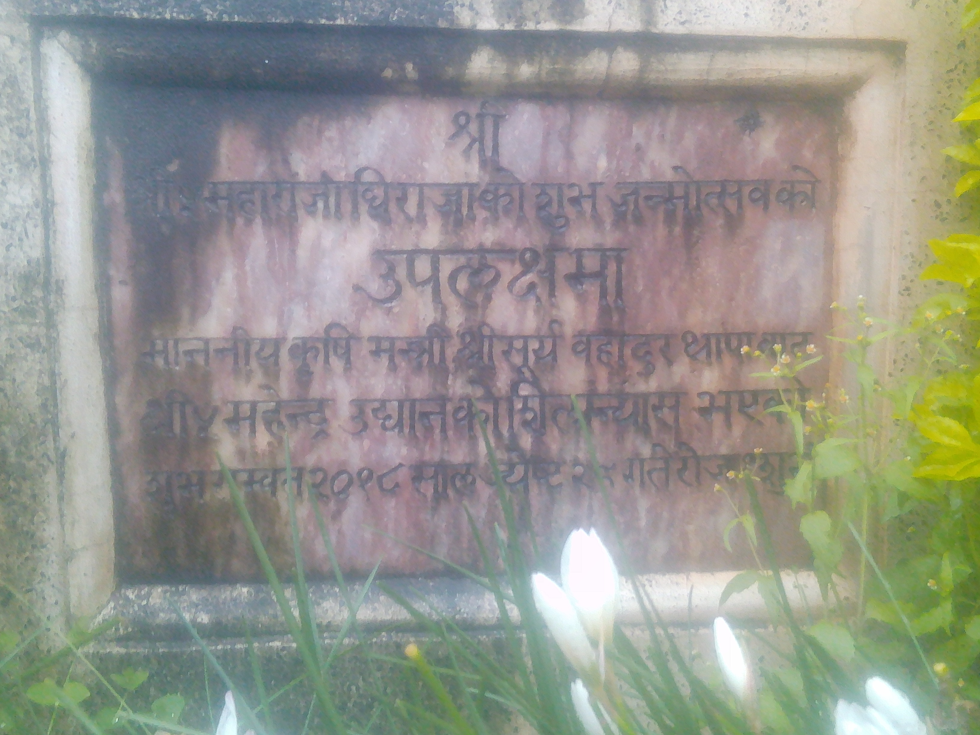 नेपाली: Mahendra udyan Balaju Baishadhaara foundation by Surya Bahadur Thapa on 2018 jestha 29